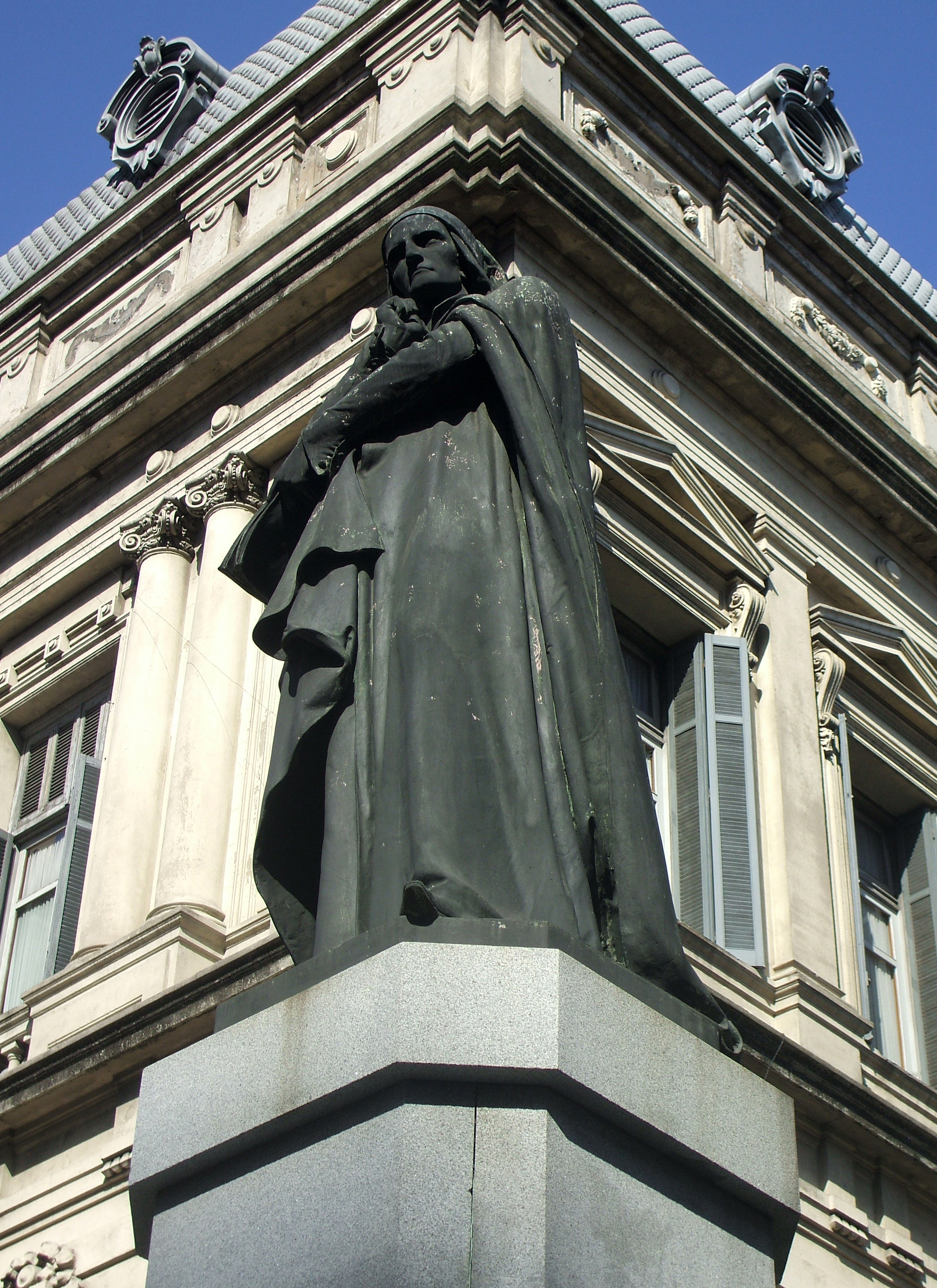 Dante Alighieri. Ubicada en el departamento de Montevideo